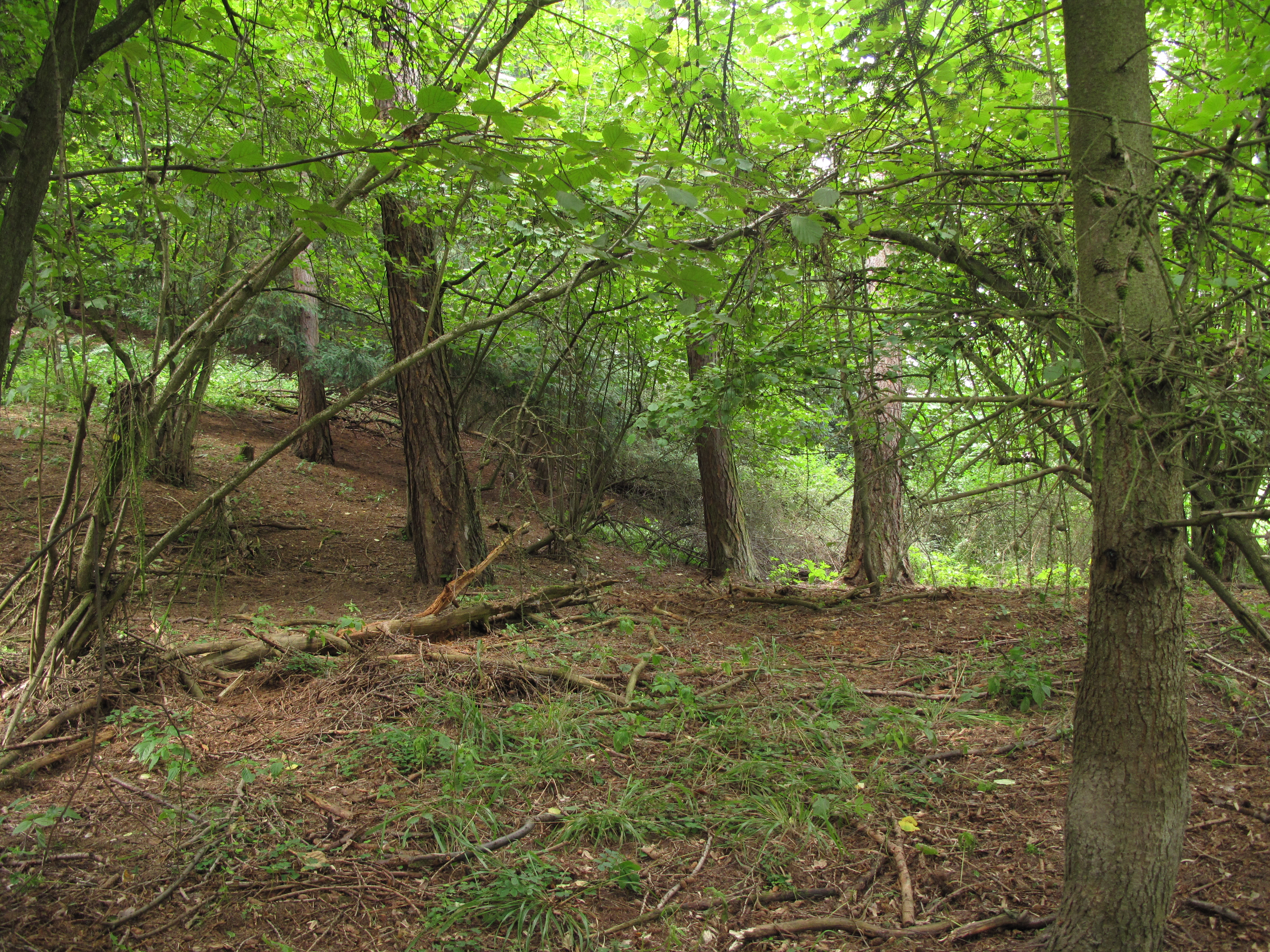 Porost v přírodní rezervaci V Horách. Okres Rokycany, Česká republika.